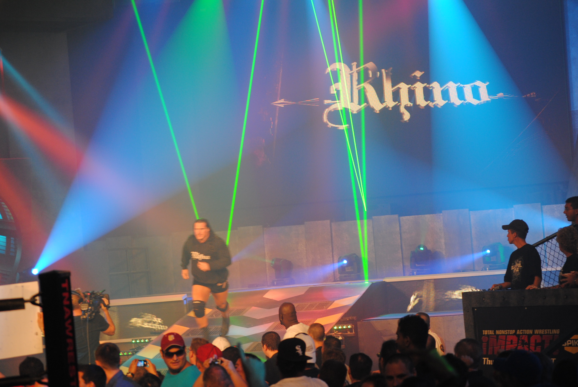 Rhino